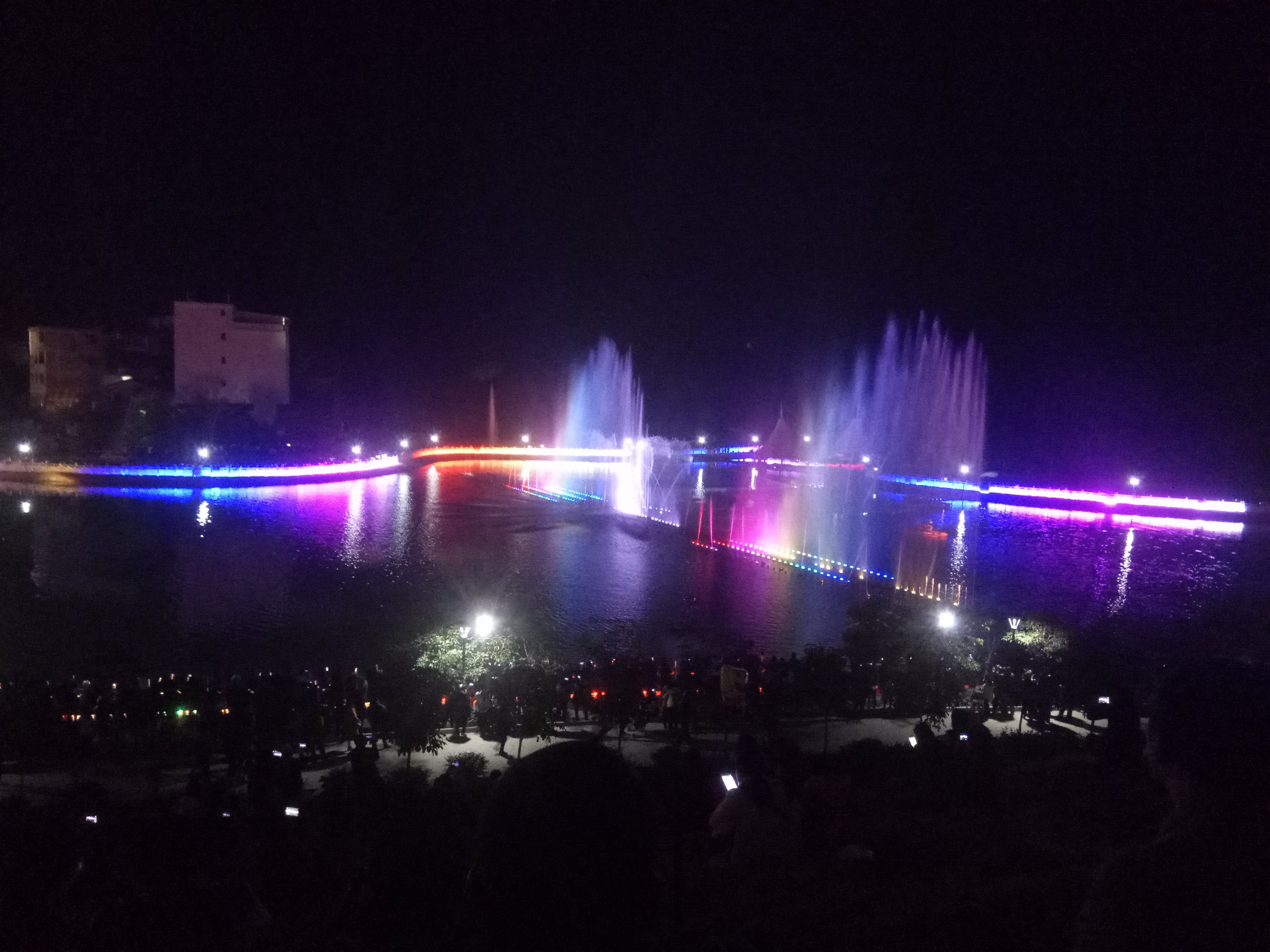 南雄市雄州公园喷泉